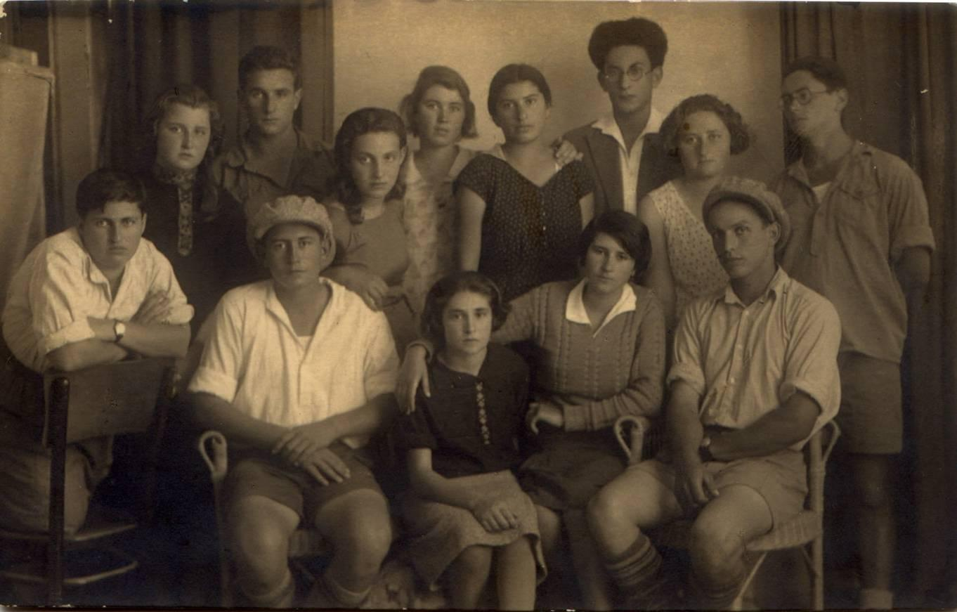 חניכי תנועת החוגים שממנה צמחה תנועת המחנות העולים. כולם תלמידי גמנסיה הרצליה מחזור תרפ"ט